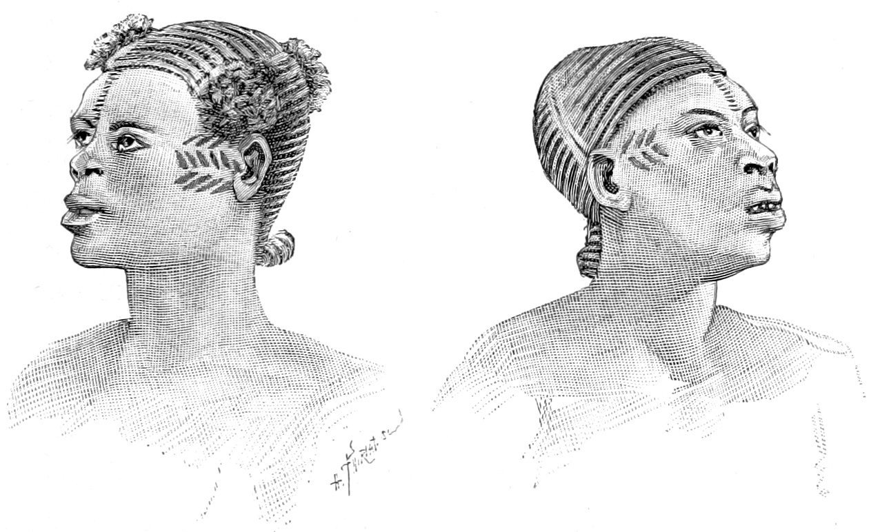 Fig. 1. — Tatouage de la tribu des Bangalas. (Dessin du lieutenant Roget.)